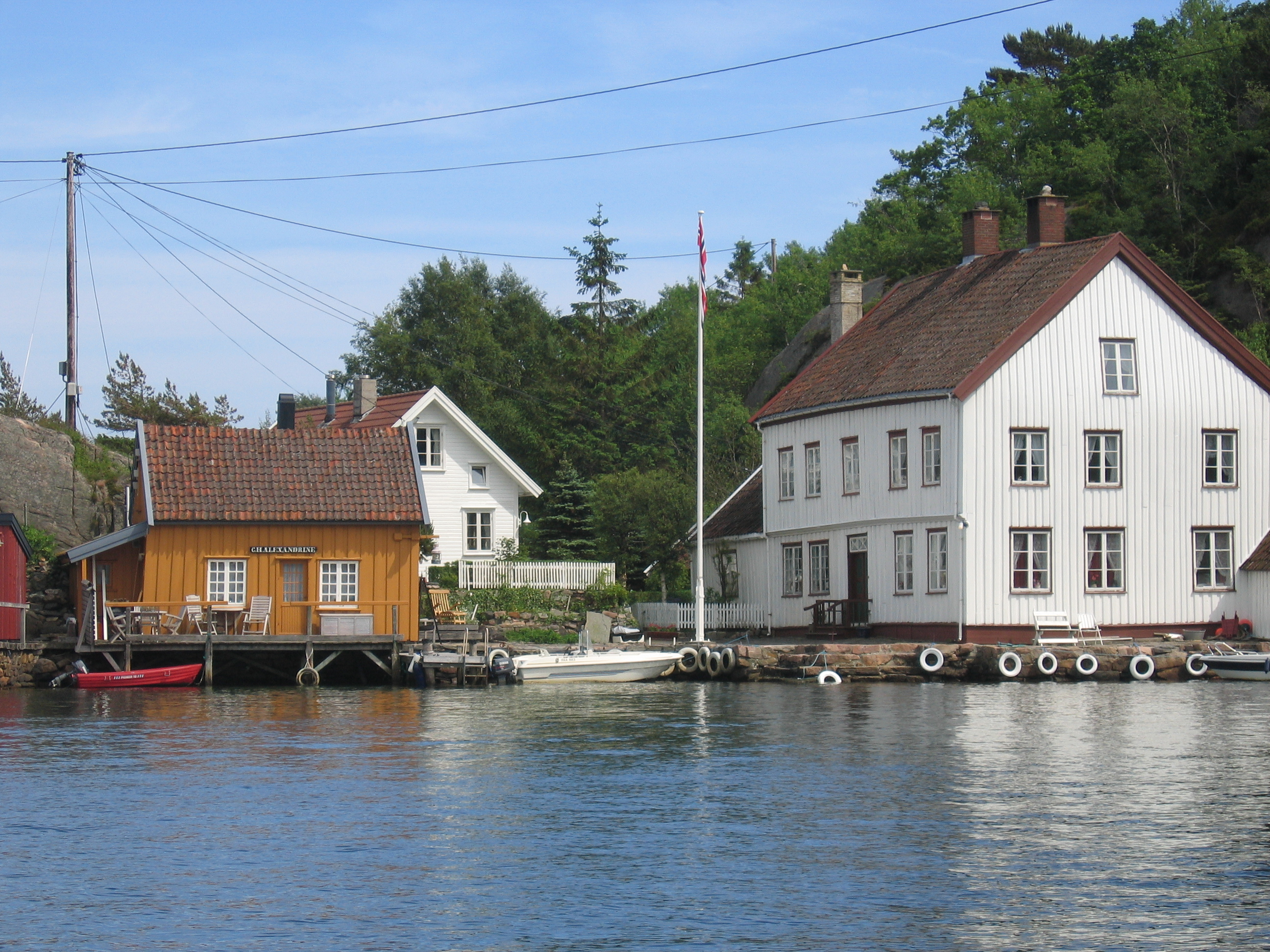 Bygningsmiljø på St.Olavs strand i Ny-Hellesund